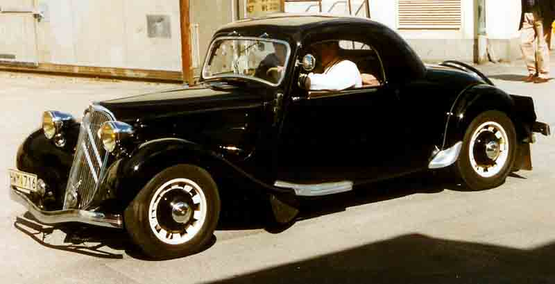 Citroen 7C Coupe 1937